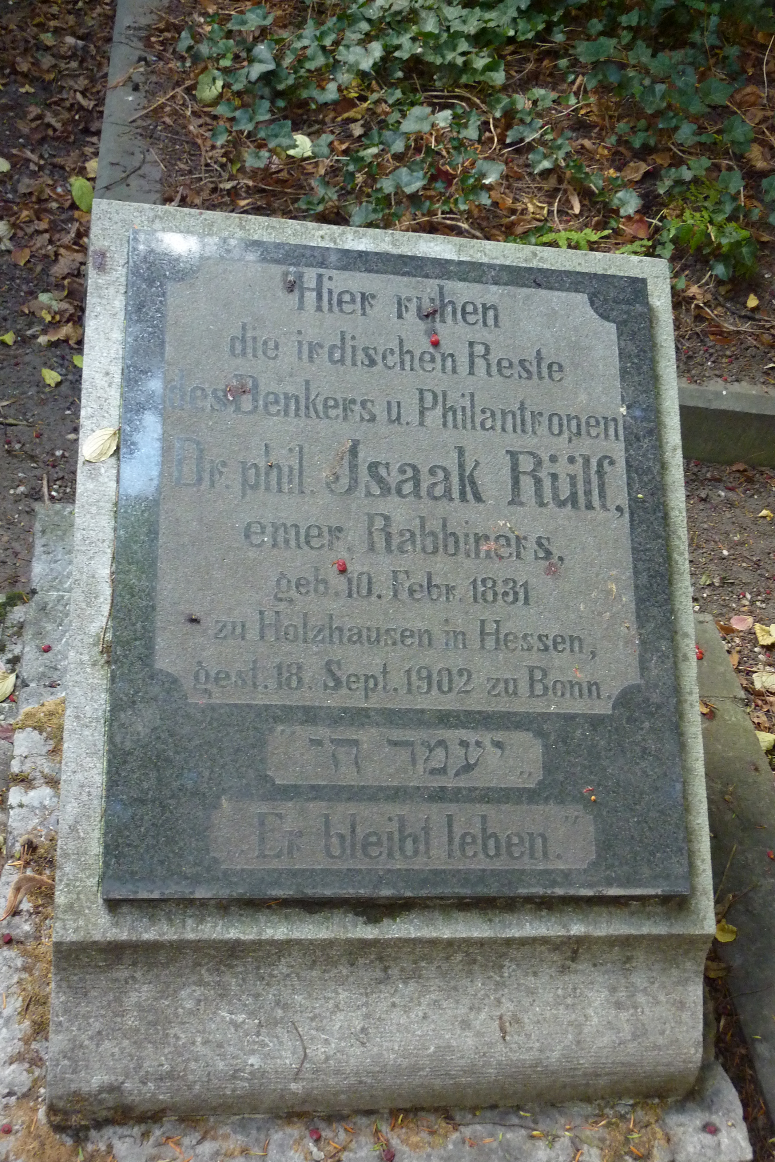 jüdischer Friedhof in Bonn-Castell, Grabstein für: „Dr. phil. Jsaak Rülf emer. Rabbiners. geb. 10. Febr. 1831 zu Holzhausen in Hessen, gest. 18. Sept. 1902 zu Bonn“